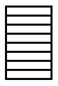 中文（台灣）: 擠樓梯棋盤